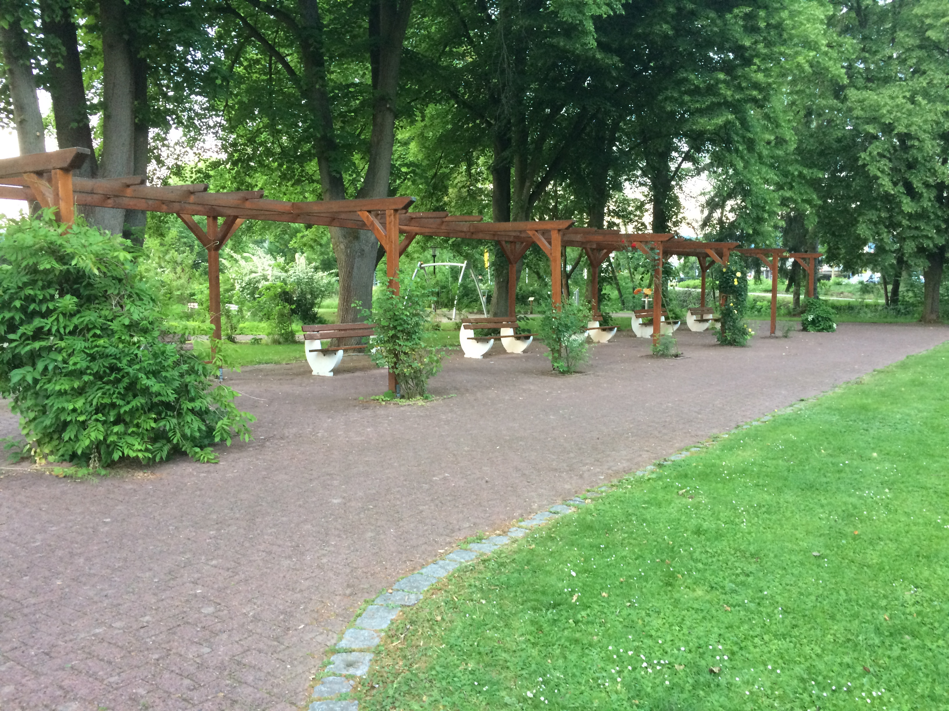 Kurpark in Bad Sooden-Allendorf 2018